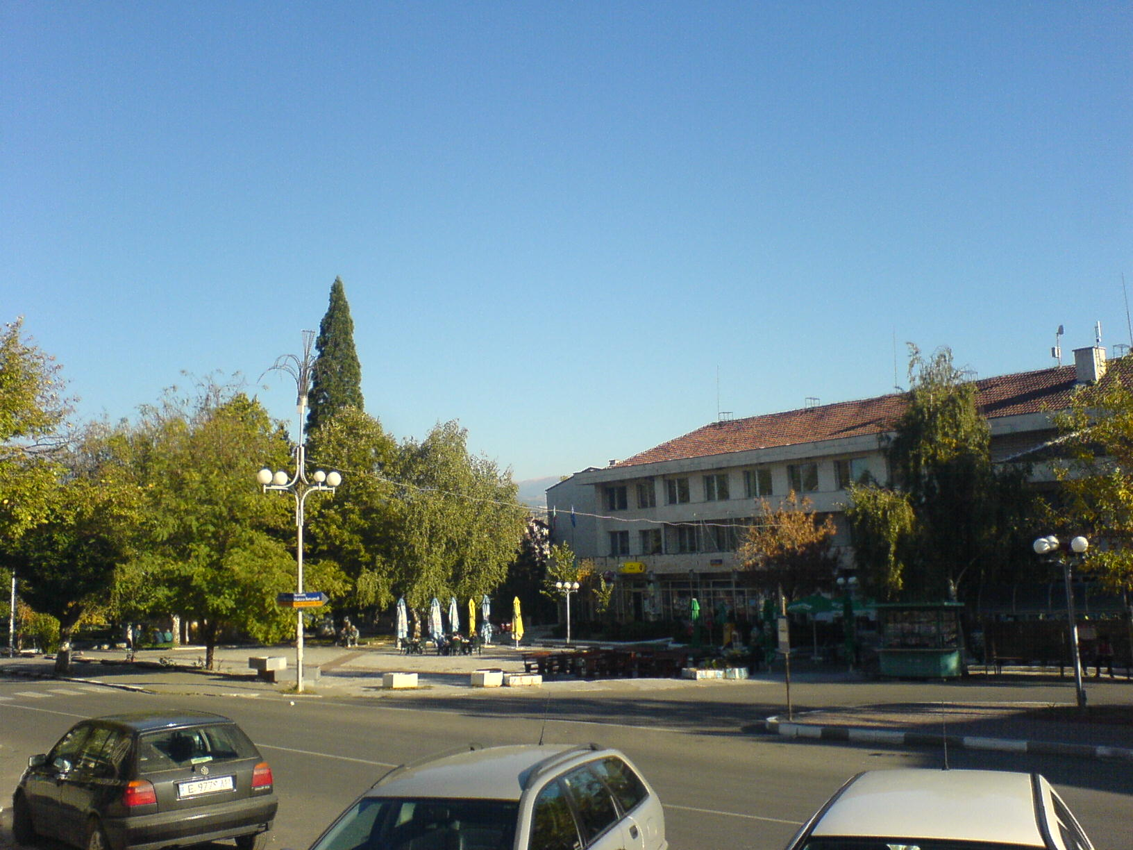 Kocherinovo, Bulgaria